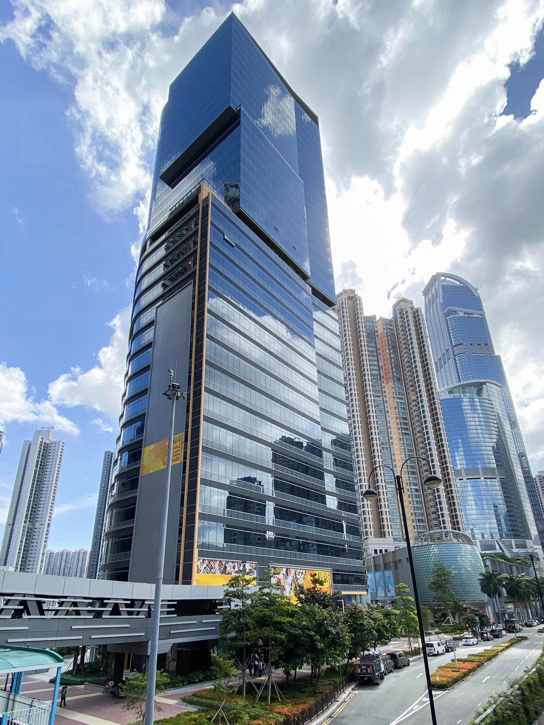 PLAZA 88